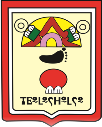 Escudo del Municipio de Teolocholco, Tlaxcala.